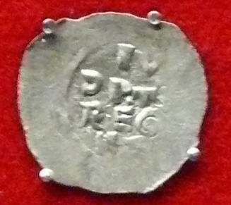 korunovační denár Vladislava II.- Judita Durynská